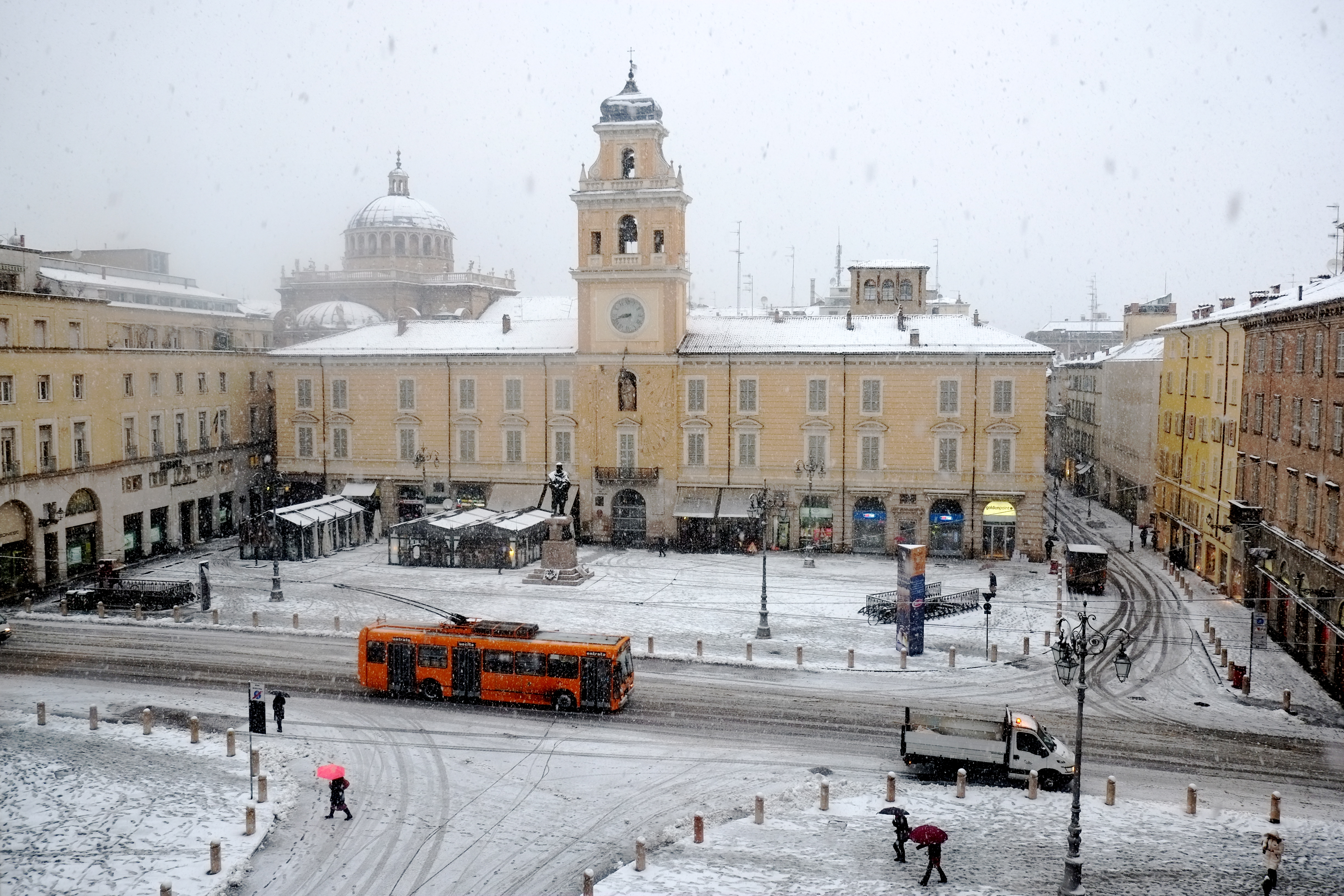 Parma, neve in piazza Garibaldi e filobus in transito.